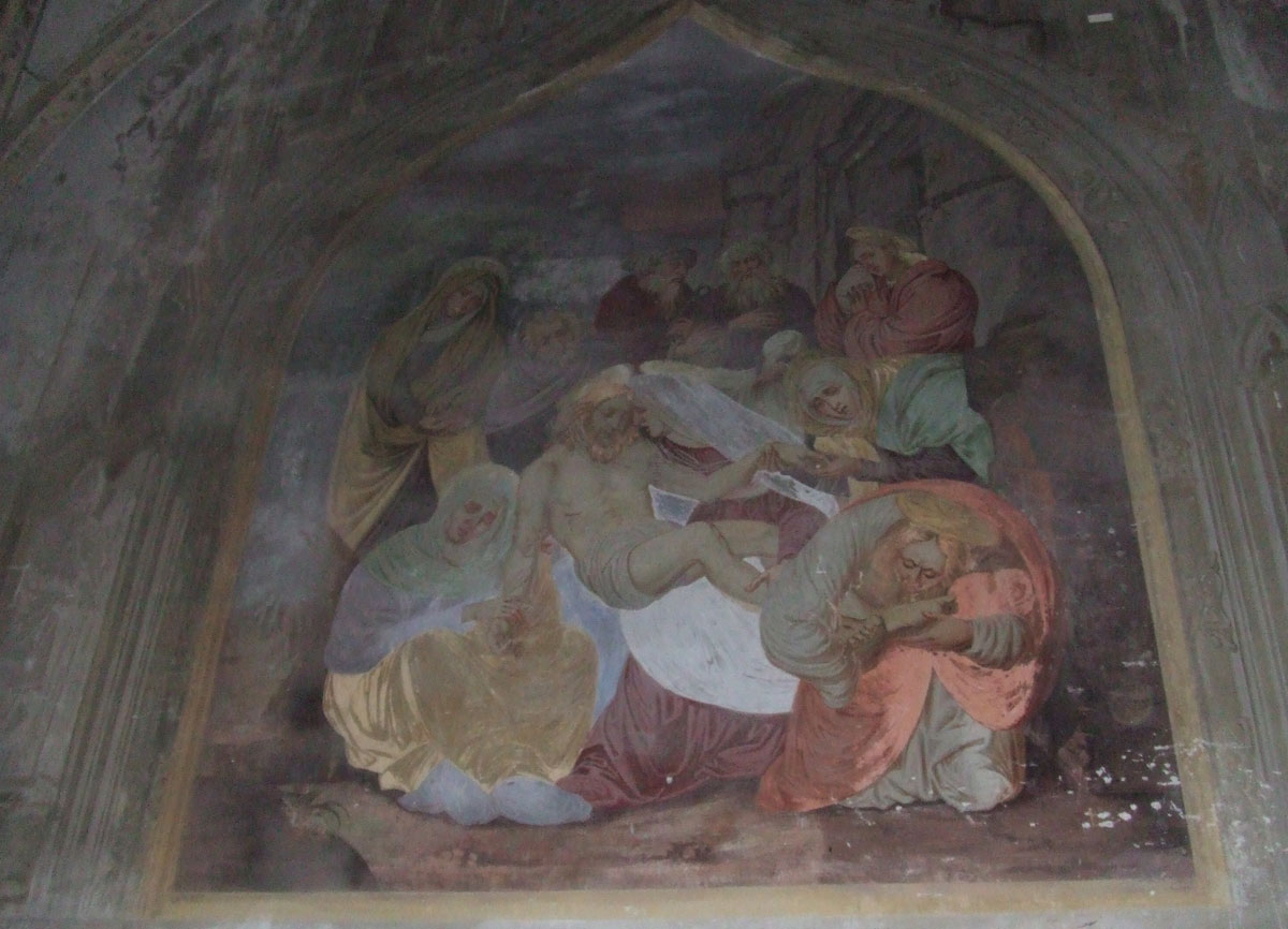 Fresque de la Déposition des frères A&G Avondo - Pont de Beauvoisin (Savoie) - France